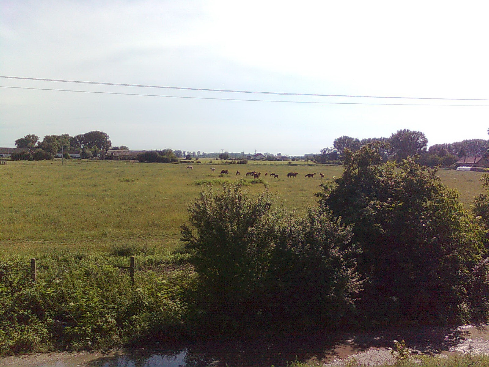 koniarska škola